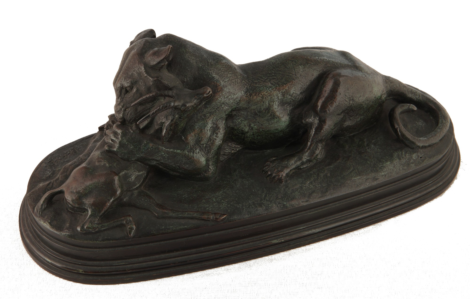 Antoine-Louis Barye, Tigre devorant une antilope. Siglo XIX. 12,5 x 35,5 x 15,5 cm, modelado y vaciado de bronce. Inv. 3578.